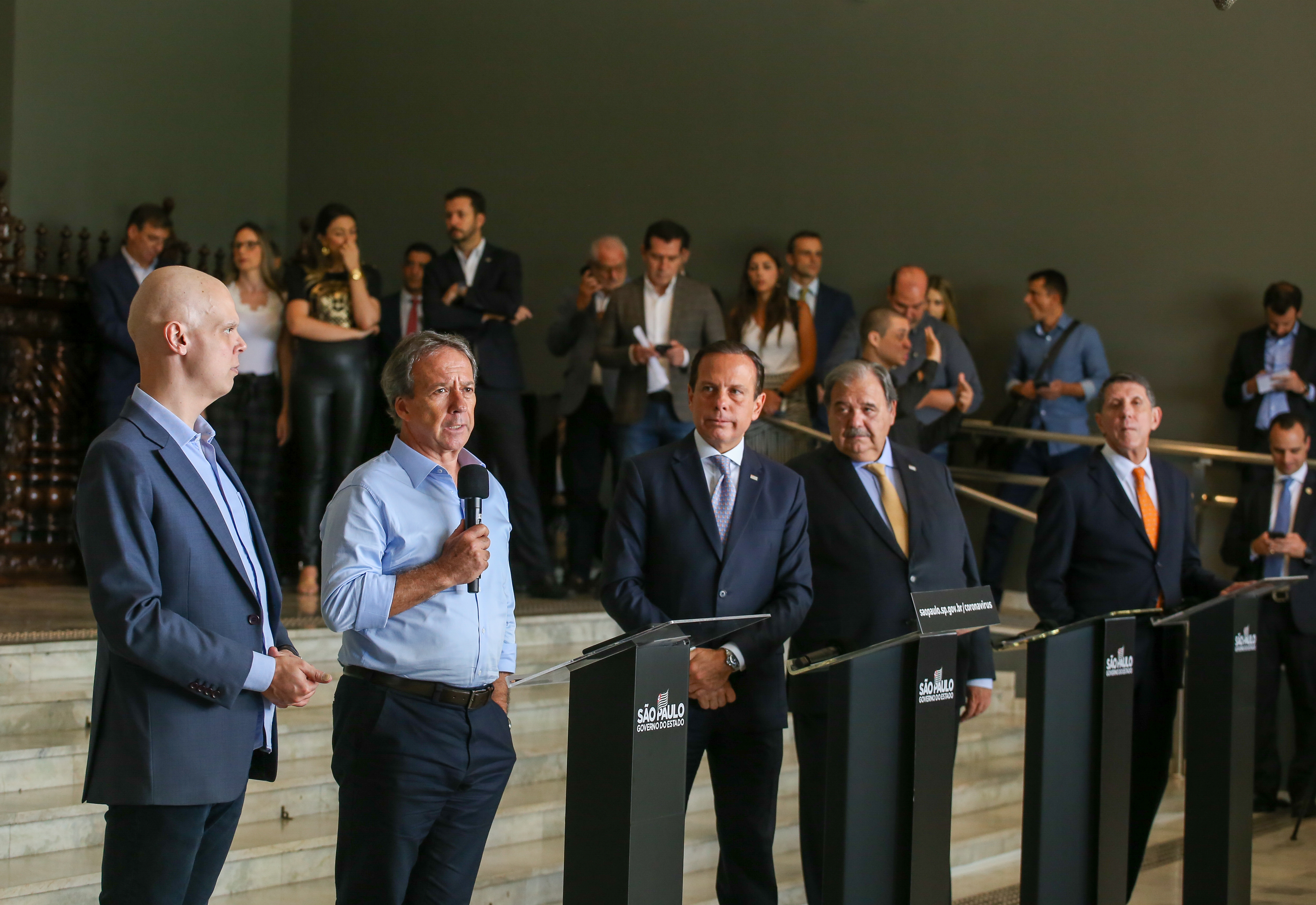 Governador do Estado de São Paulo, João Doria, durante coletiva de imprensa sobre coronavírus Loca: São Paulo\SP. Data: 20\03\2020 Foto: Governo do Estado de São Paulo